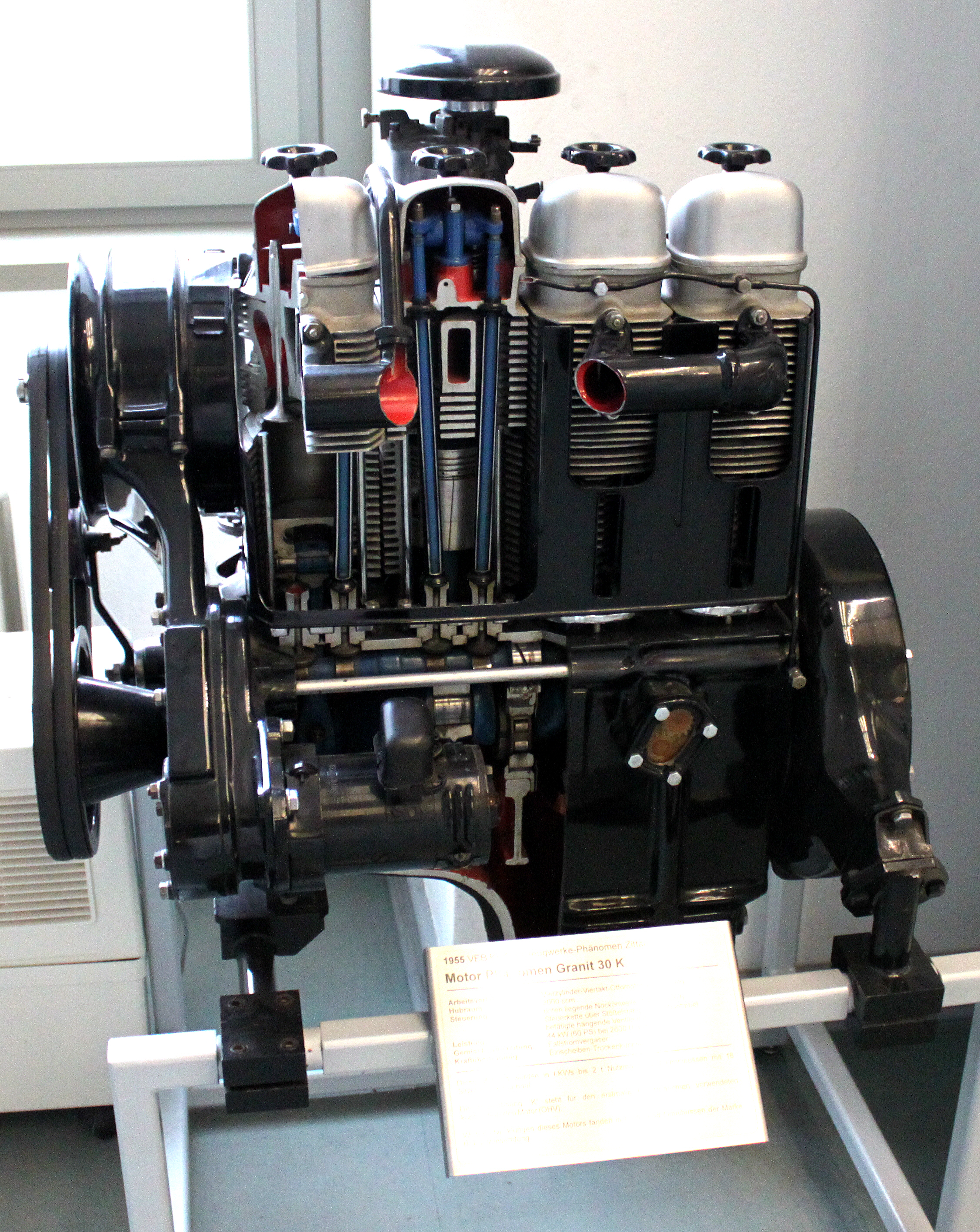 Motor des Phänomen Granit 30K im Verkehrsmuseum Dresden